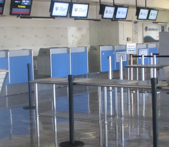 Aeropuerto de Aguascalientes